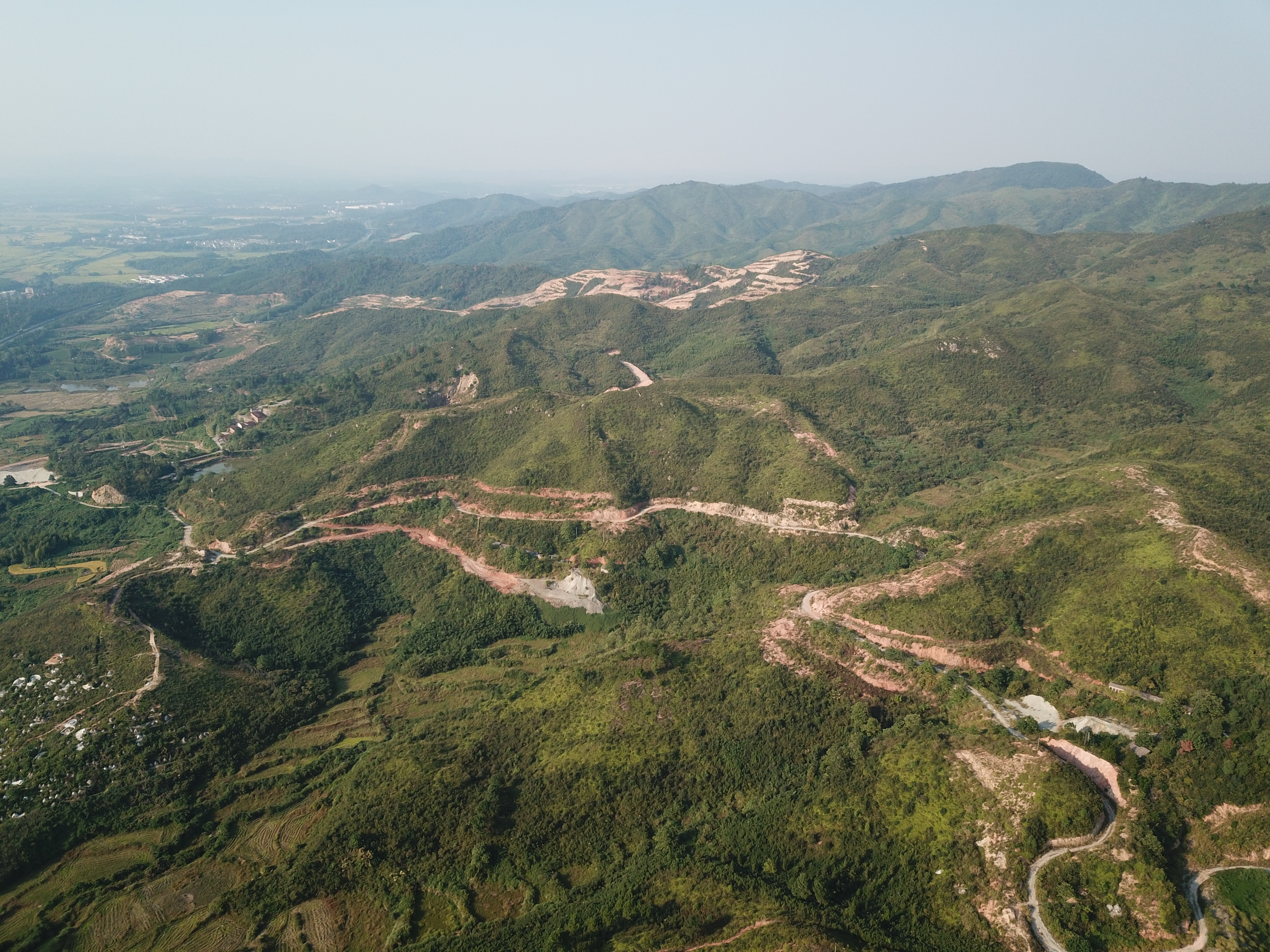 金溪县宝山金银矿冶遗址